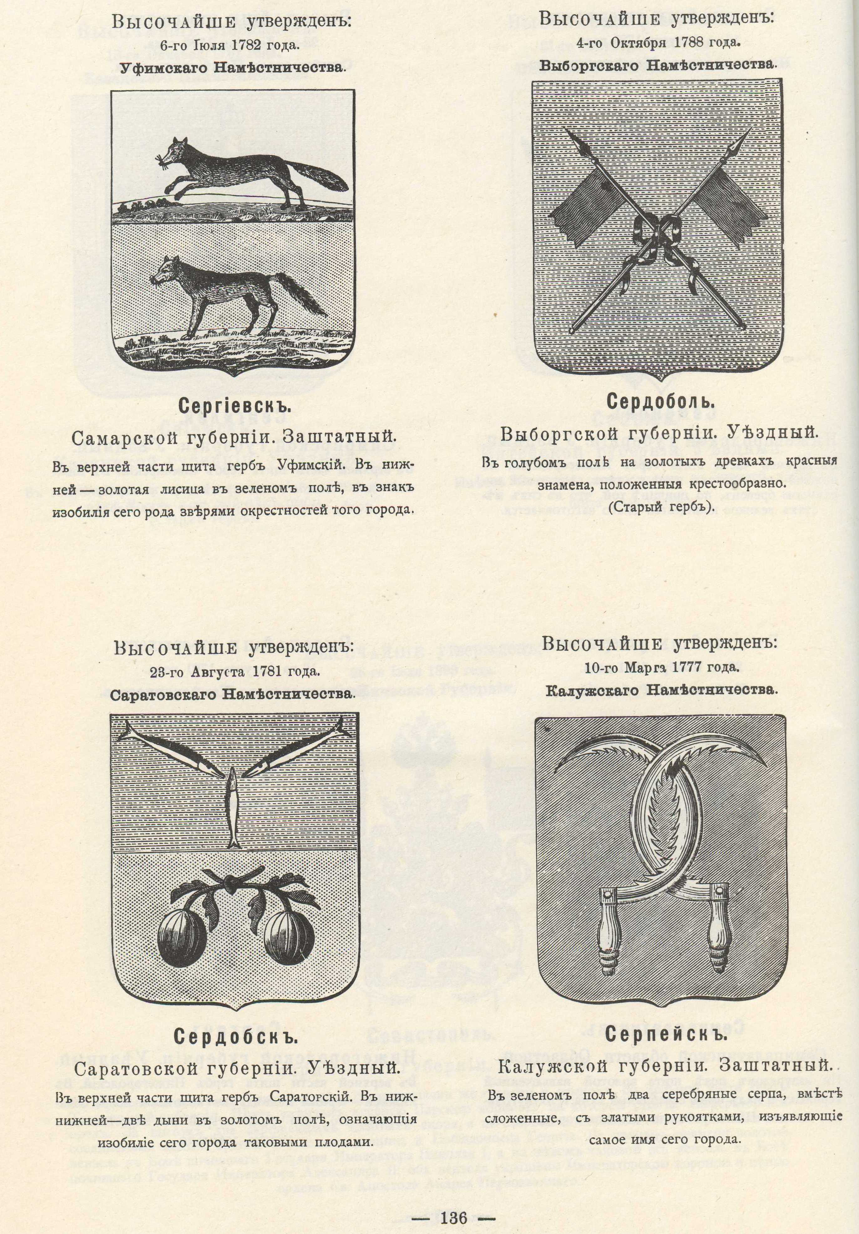 Official Russian Empire coats of arms. Гербы городов Российской Империи Сергиевск Сердоболь Сердобск Серпейск с официальными описаниями в Гербовнике Винклера.